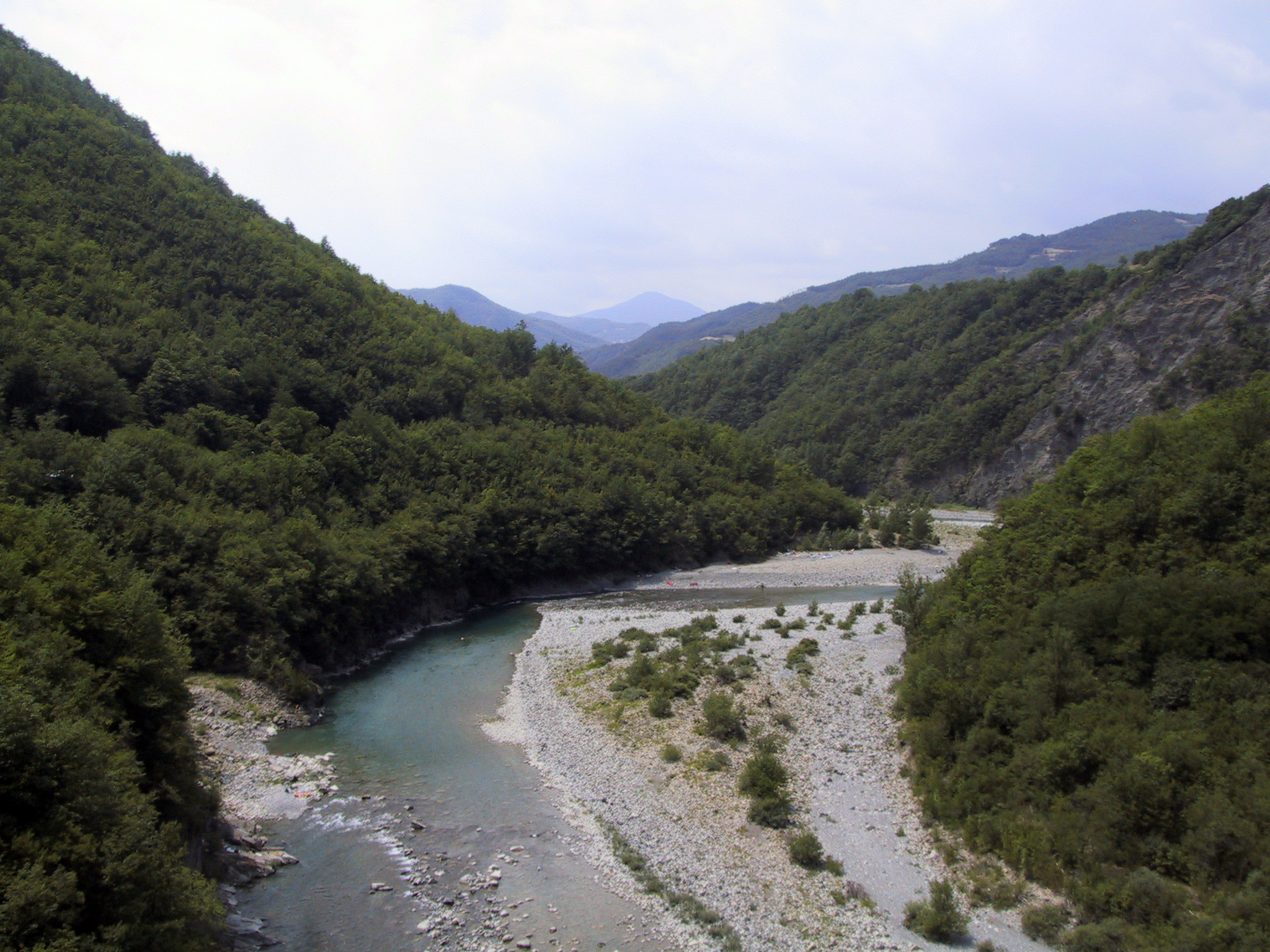 Foto da me scattata dalla Statale della Val del Trebbia (SS 45) pochi km a sud di Bobbio direzione Genova durante una gita in moto. Luglio 2006. Immagine di pubblico dominio.